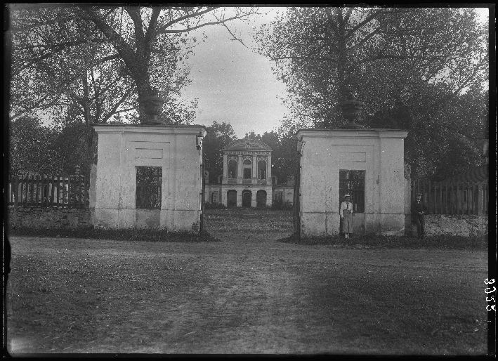 Беларуская (тарашкевіца): Горадня (Horadnia), Аўгустовак (Aŭgustovak). Сядзіба